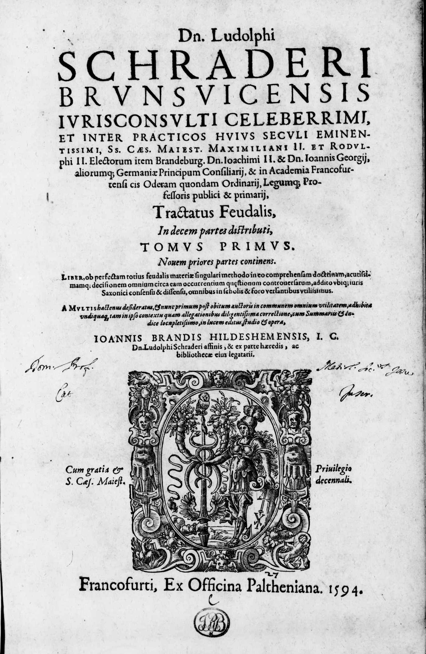 Frontespizio